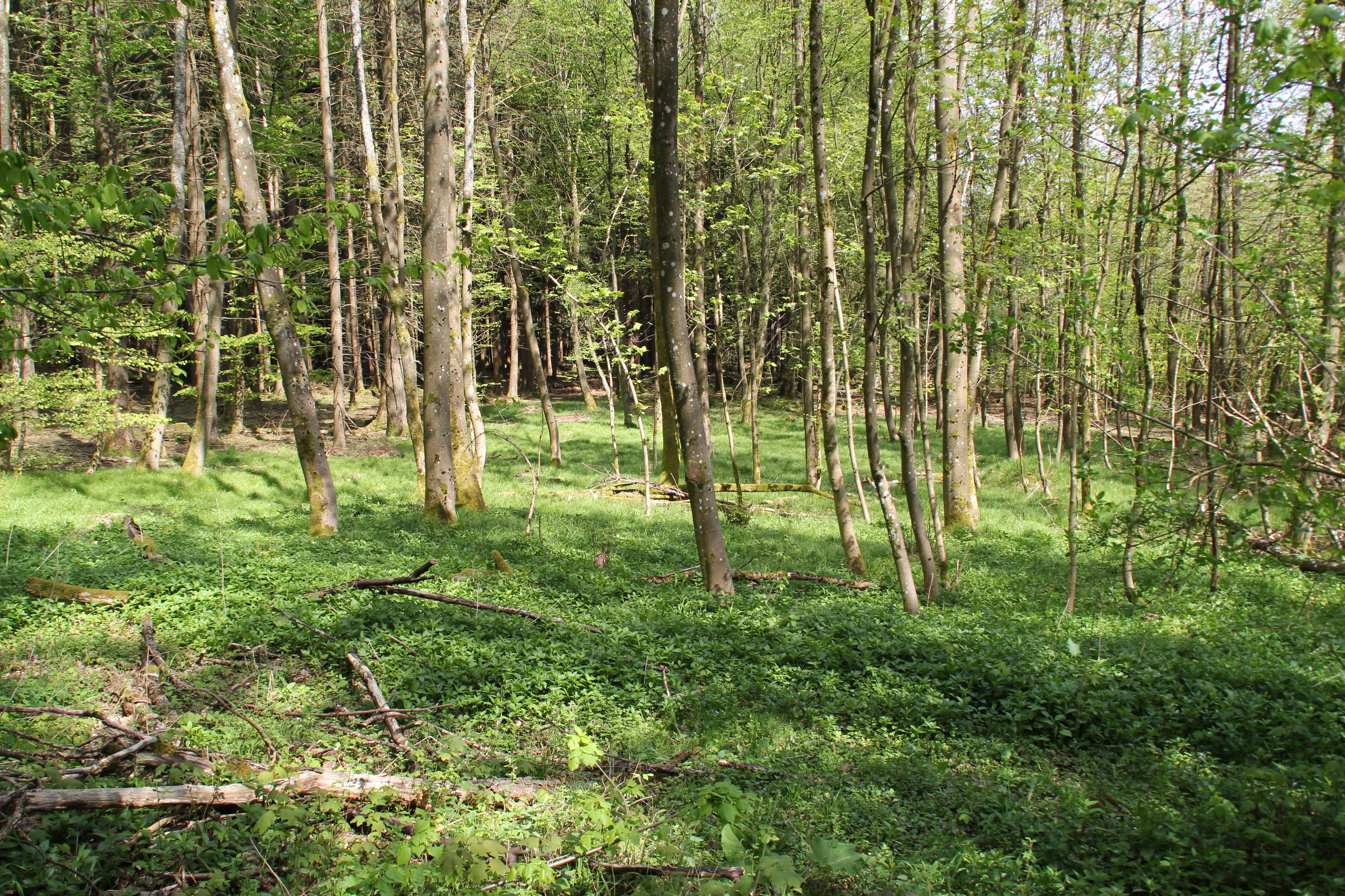 Im Naturschutzgebiet Beilstein bei Lettgenbrunn im Spessart